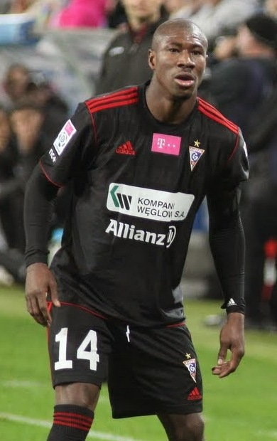 Prejuce Nakoulma w barwach Górnika Zabrze